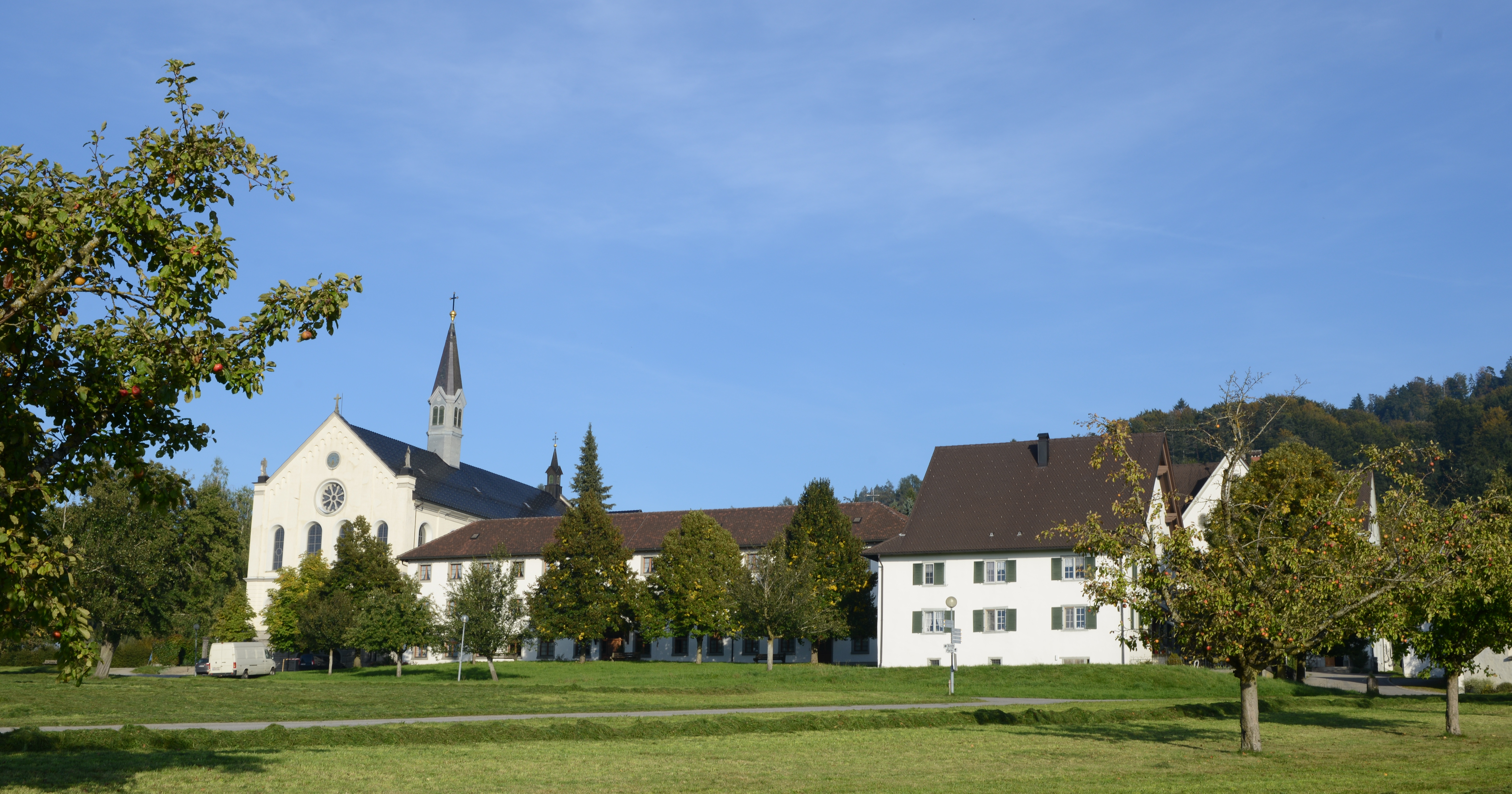 Zisterzienserinnenabtei Mariastern Kloster Maria Stern - Gwiggen in Hohenweiler, Vorarlberg. NOTE: This image is a panorama consisting of multiple frames that were merged or stitched in software. As a result, this image necessarily underwent some form of digital manipulation. These manipulations may include blending, blurring, cloning, and color and perspective adjustments. As a result of these adjustments, the image content may be slightly different than reality at the points where multiple images were combined. This manipulation is often required due to lens, perspective, and parallax distortions.